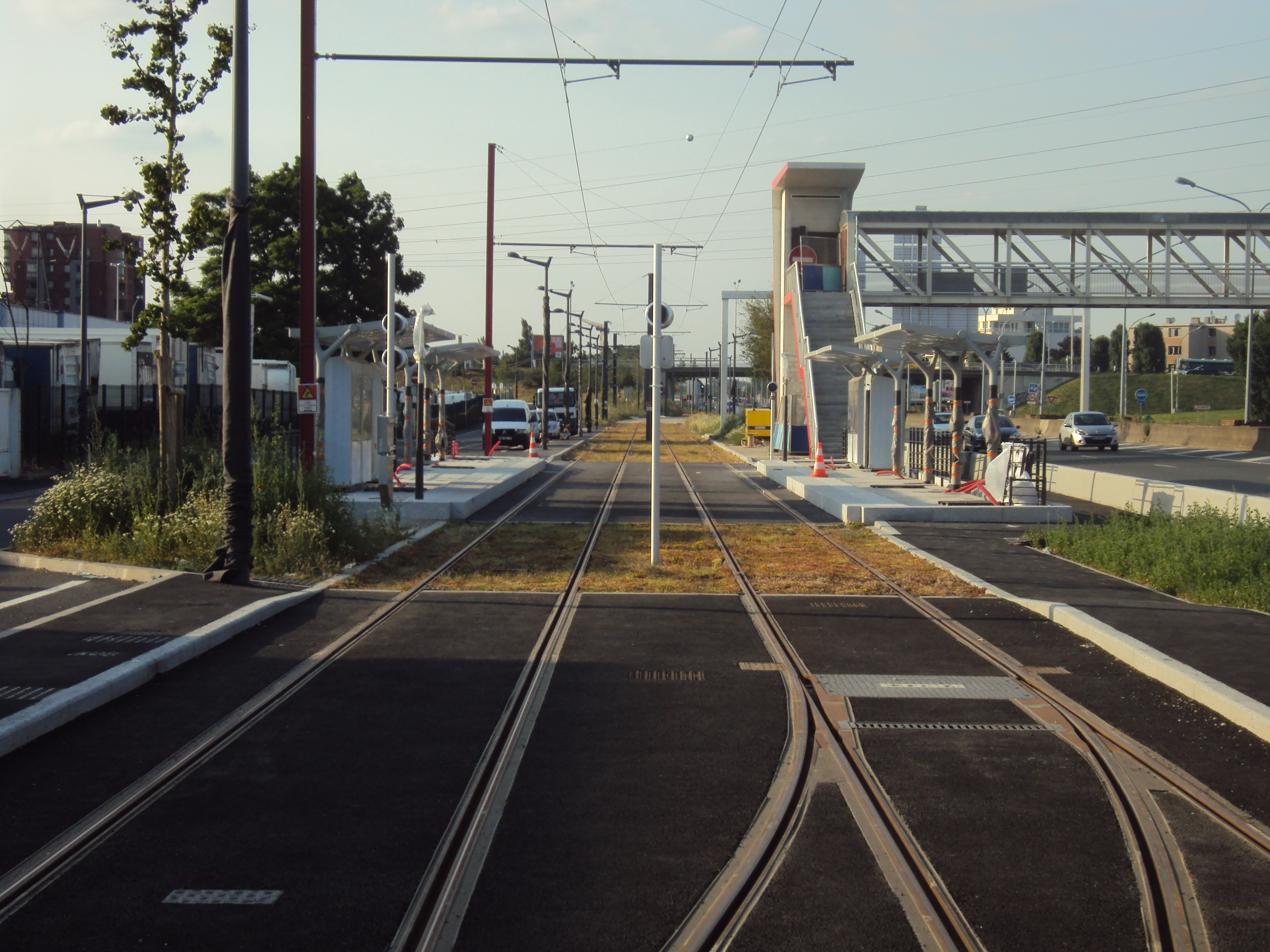 Travaux du T7 au voisinage de Belle épine